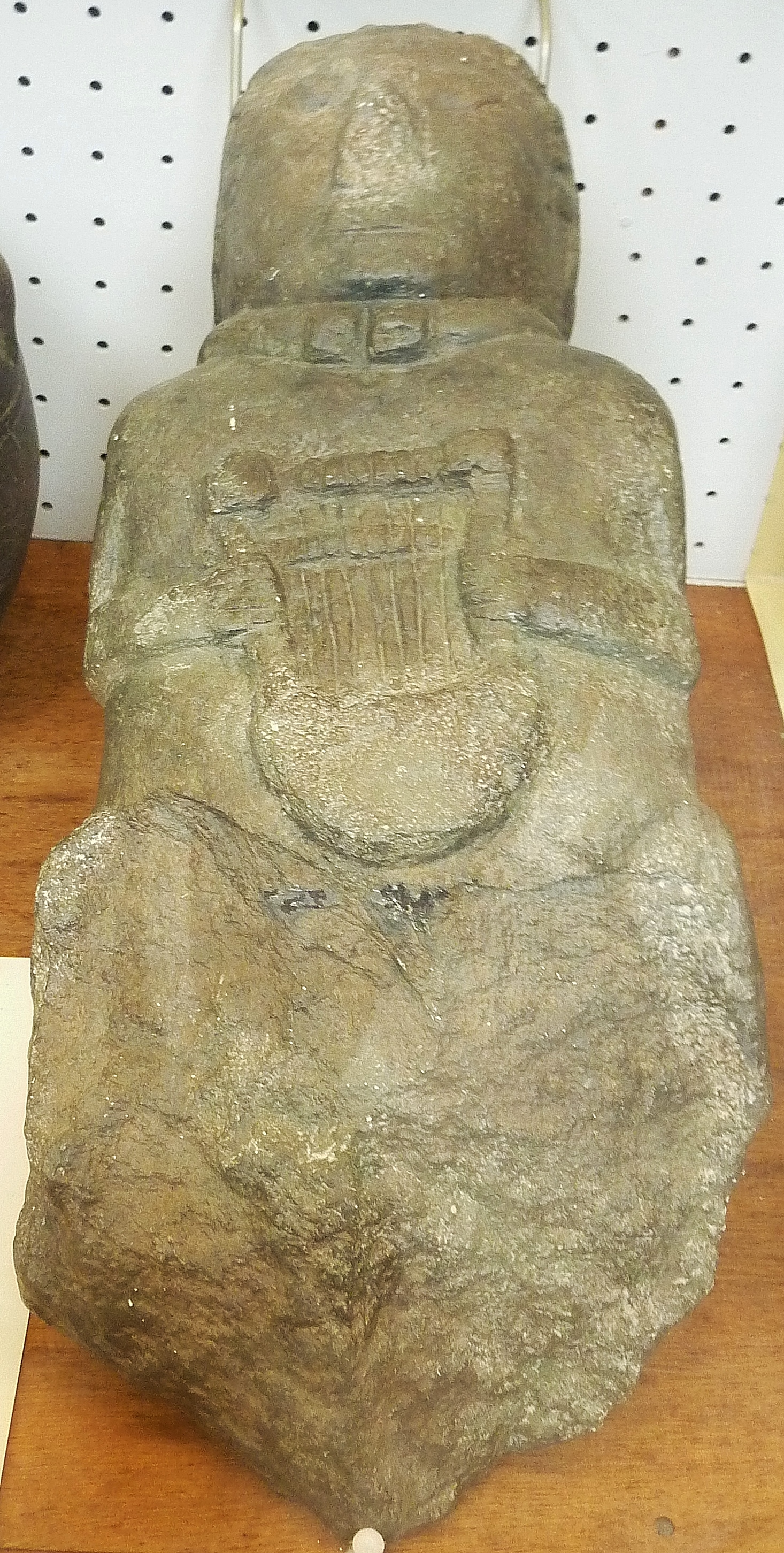 Une des quatre sculptures trouvées dans un fossé du camp gaulois de Saint-Symphorien à Paule (Côtes-d'Armor) où elles ont été enfouies vers la fin du IIe siècle. Cette sculpture est en métahornblendite, roche provenant de Kerlevot en Pleuven (Finistère) . Le torque qui orne son cou et la lyre laissent supposer que le personnage représenté serait un barde (moulage, Musée de la préhistoire finistérienne de Penmarc'h).